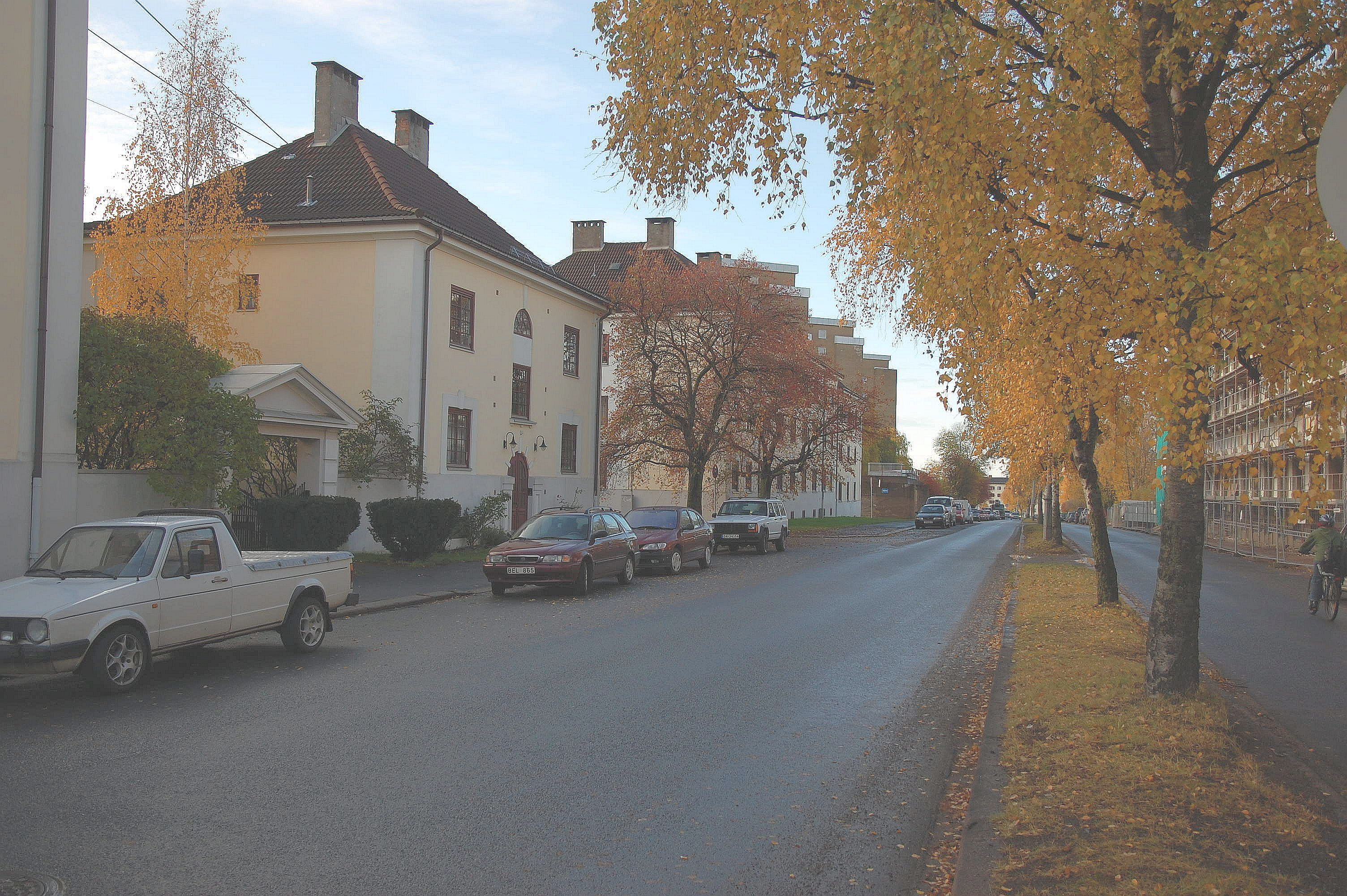 Stavangergata sett fra Lisa Kristoffersens plass. Sagene/Bjølsen, Oslo